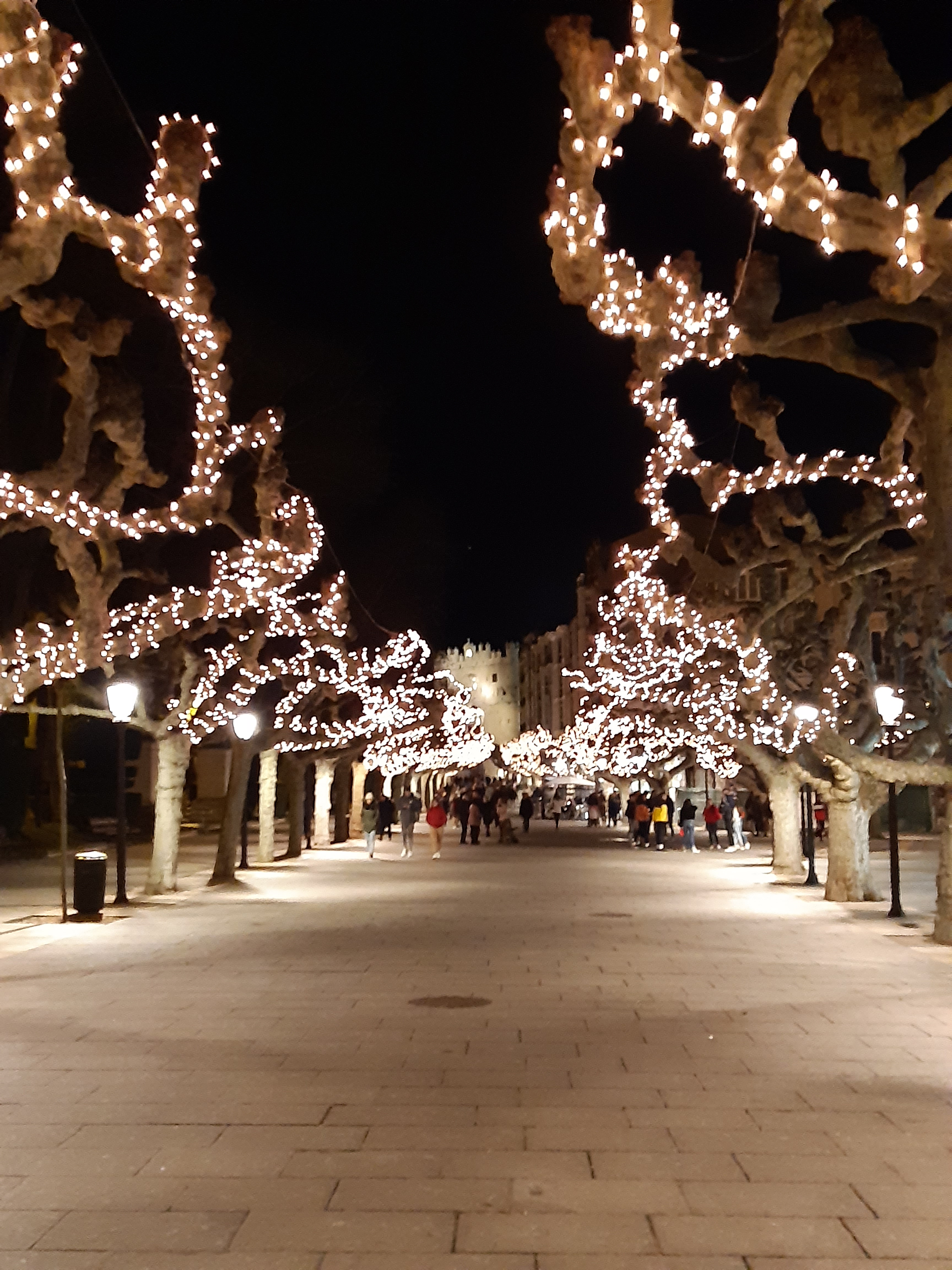 Vista del paseo del Espolón (Burgos) con el arco de Santa María de fondo.